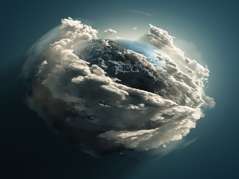 അന്തരീക്ഷ നദി